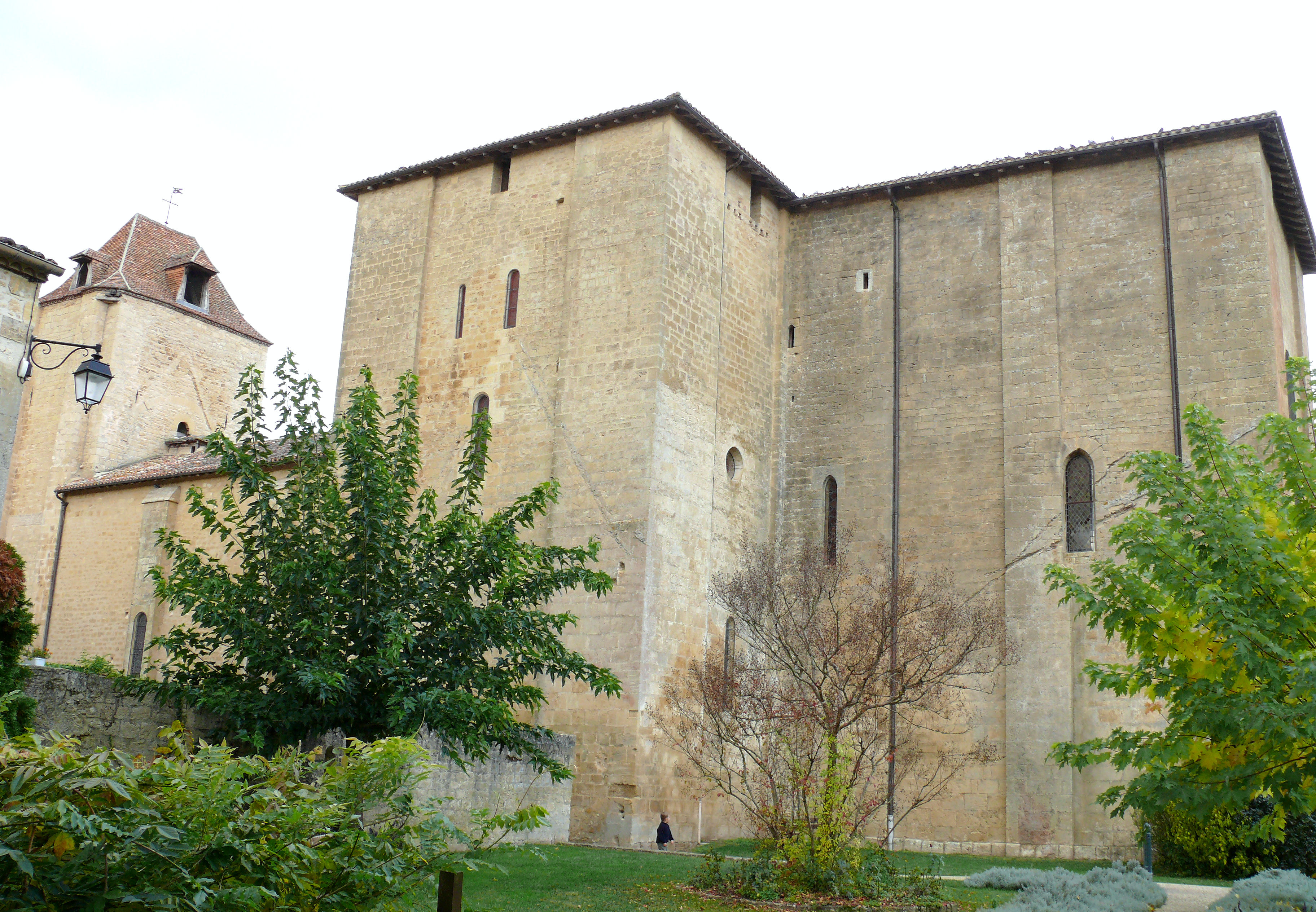 Trémolat - Eglise Saint-Nicolas - Vue d'ensemble, côté sud